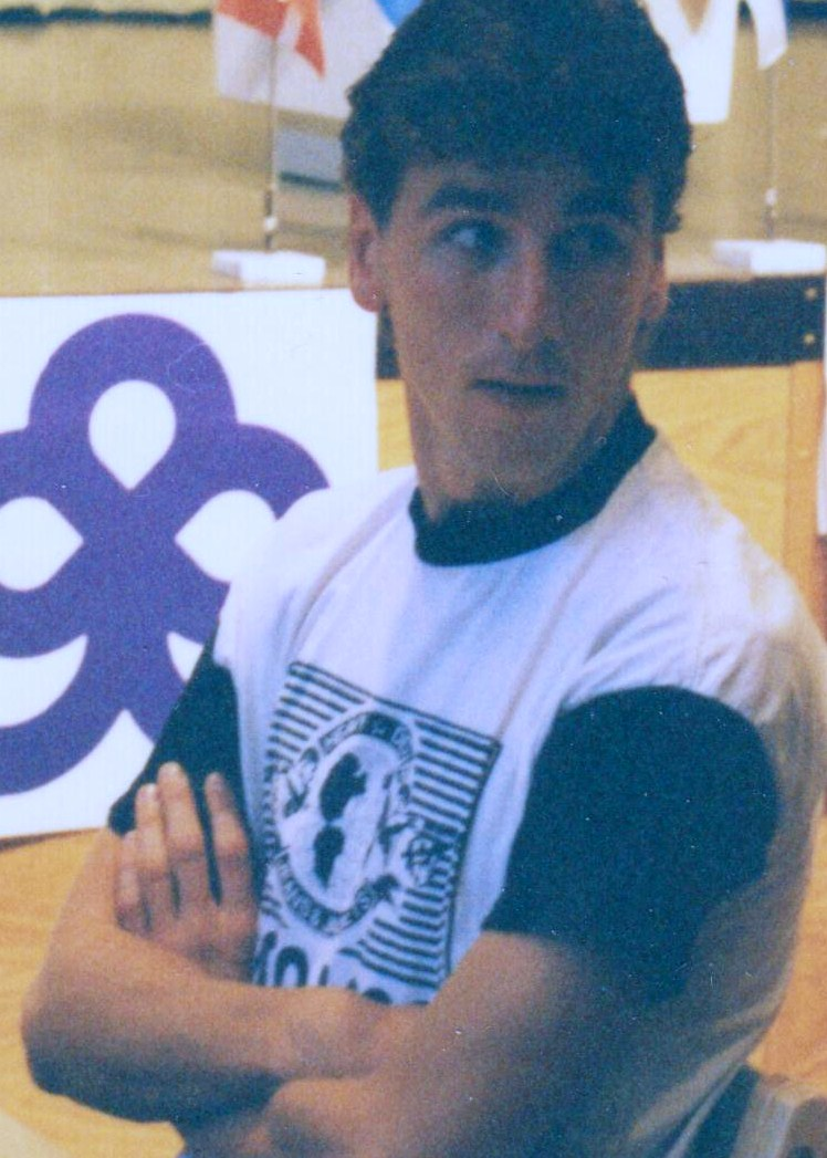 Simen Agdestein bei seiner Schachpartie mit Helgi Olafsson im Zonenturnier 1989 in Espoo nahe bei Helsinki (Finnland).